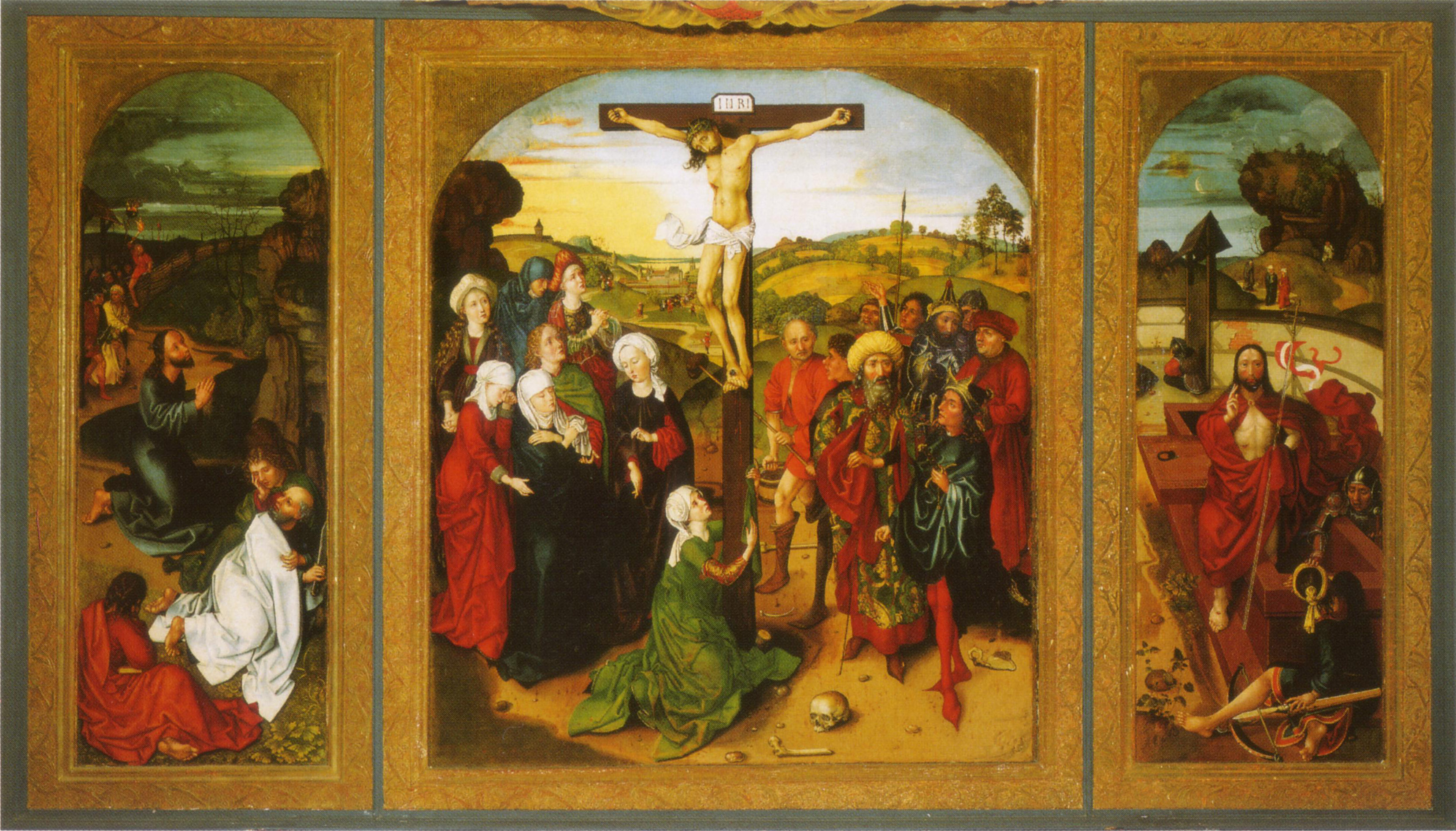 Das spätgotische Altarbild der Marienkirche in Leipzig-Stötteritz.